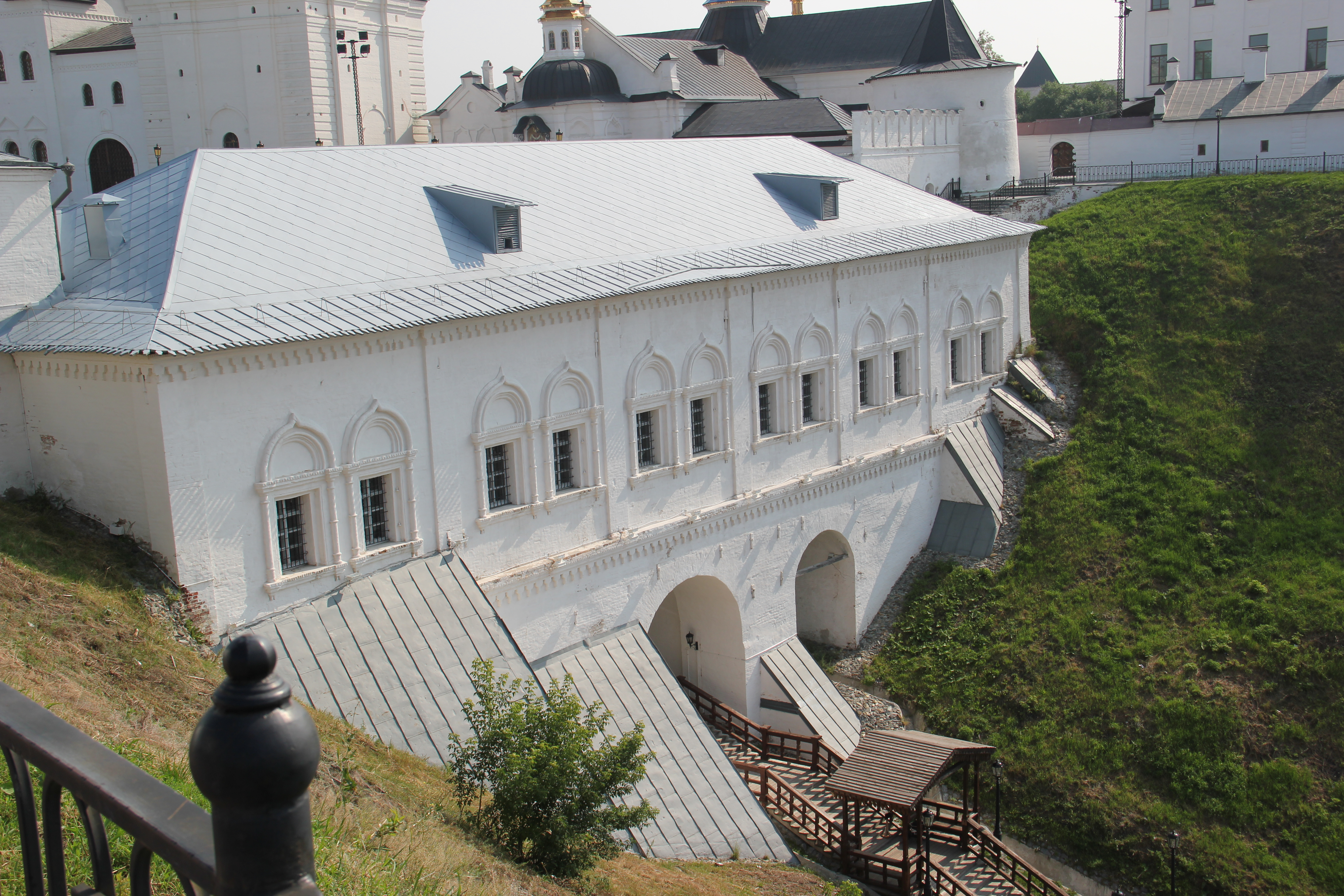 Рентерея (Шведская палата) (Тюменская область, Тобольск, Красная площадь, 2)